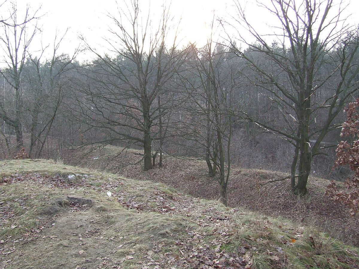 Fort I Twierdzy Warszawa, Warsaw